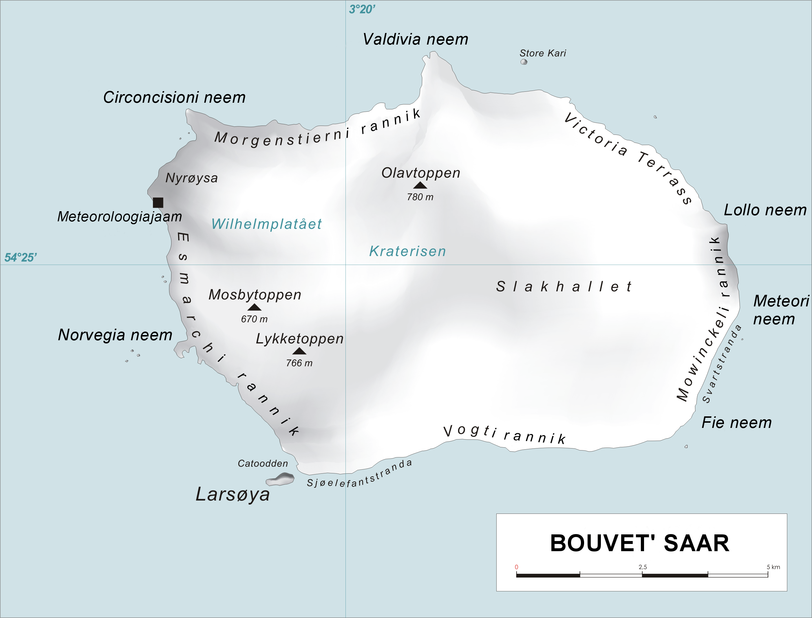 Bouvet' saar